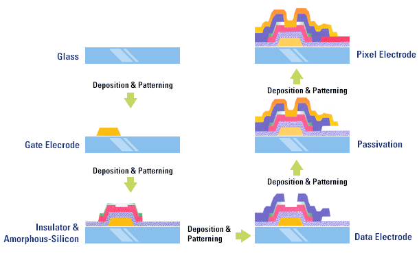 proces fabricació tft